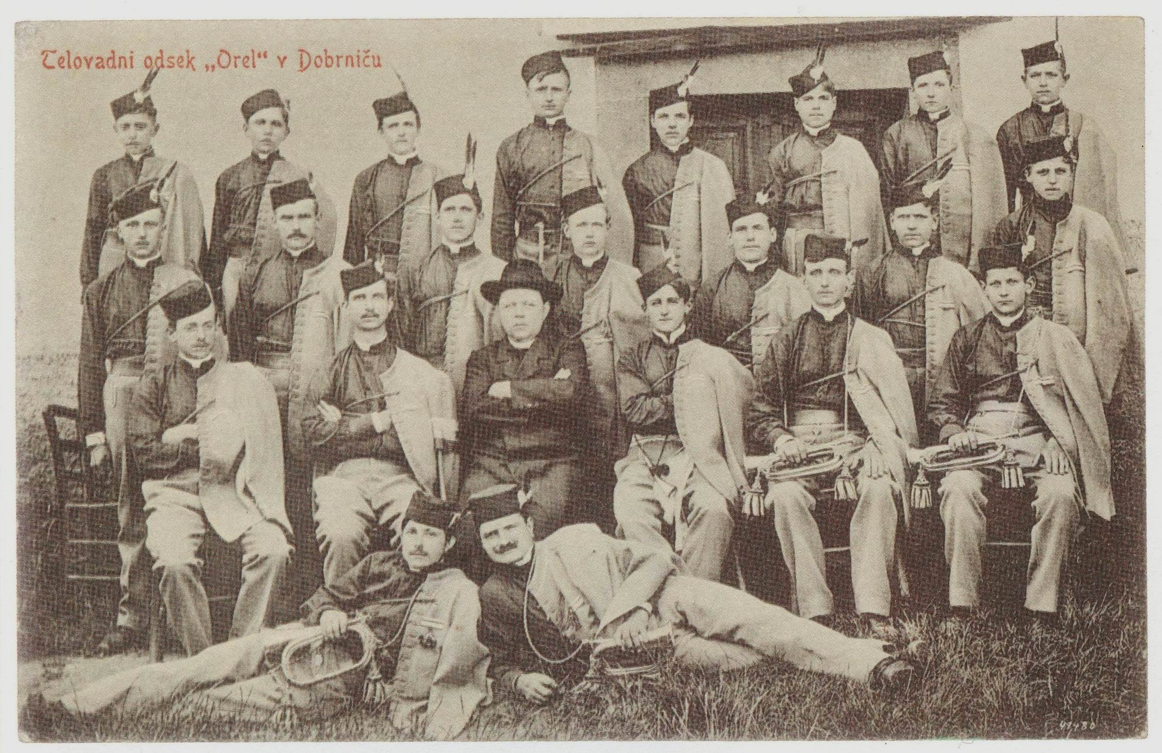 Telovadni odsek Orla v Dobrniču.